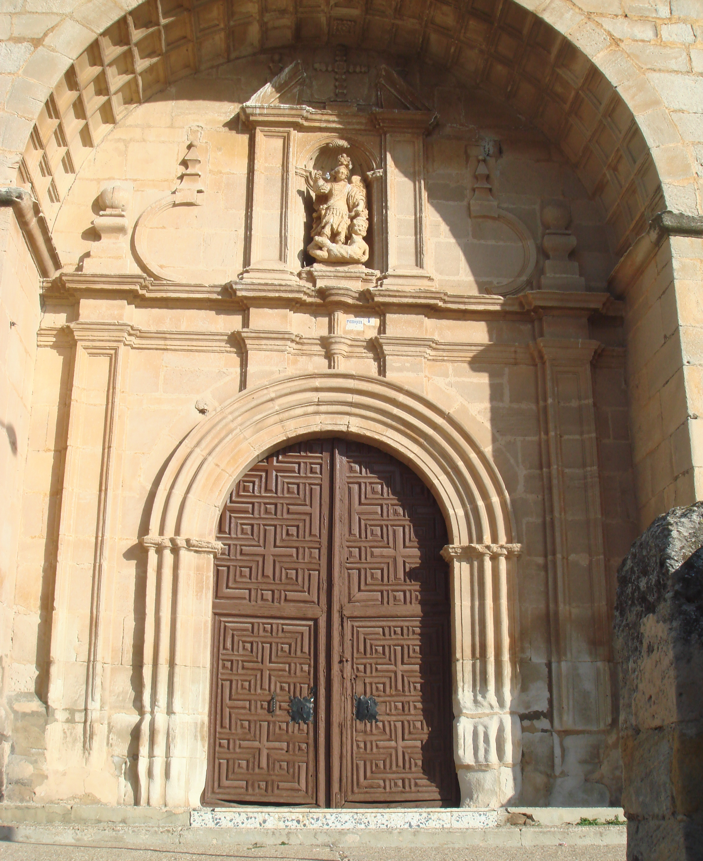 Villalba de Duero, Ribera del Duero, Burgos, Spain, portada Iglesia San Miguel.